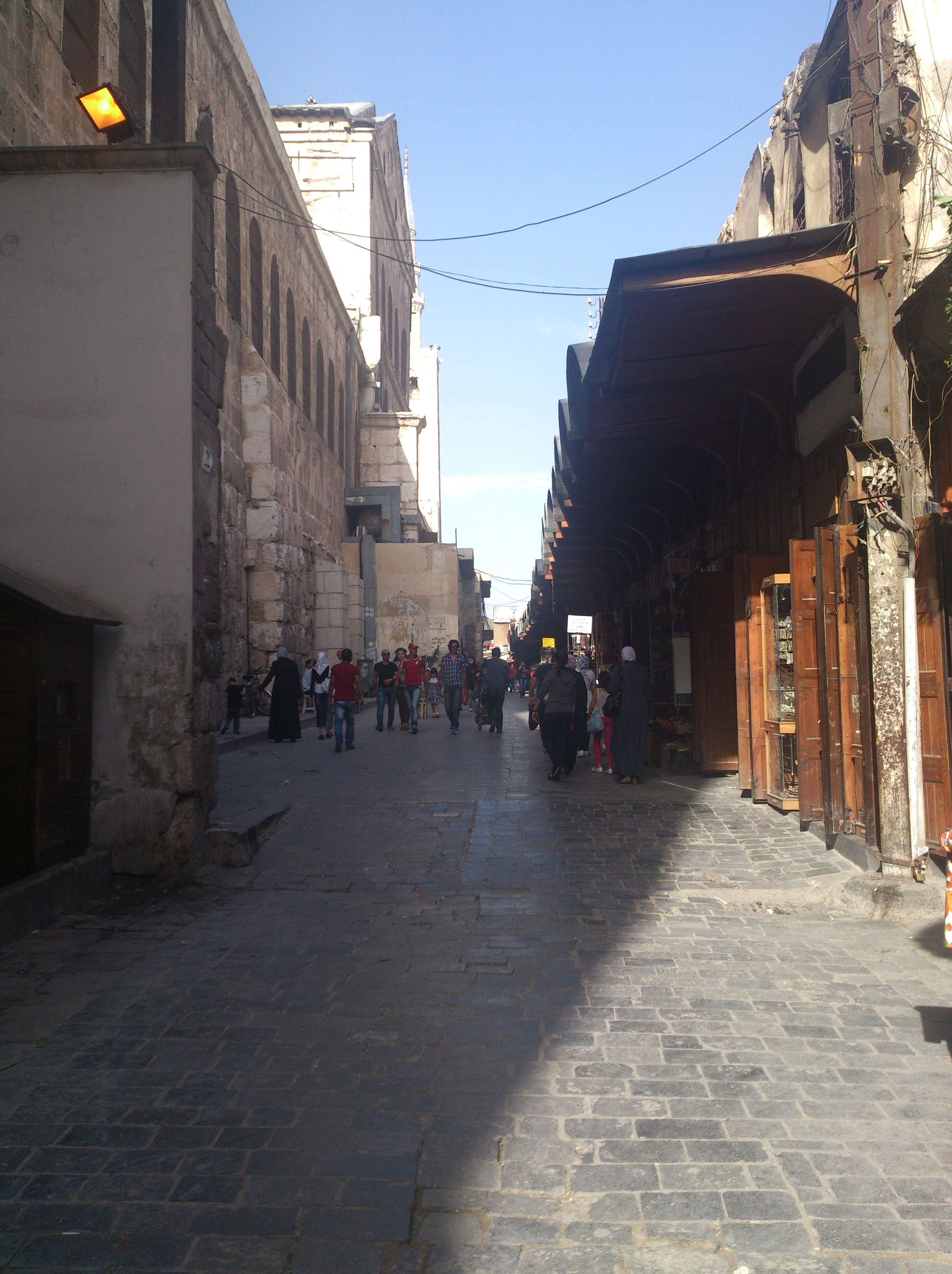 سوق معروف بمصنوعاته اليديوية الخشبية